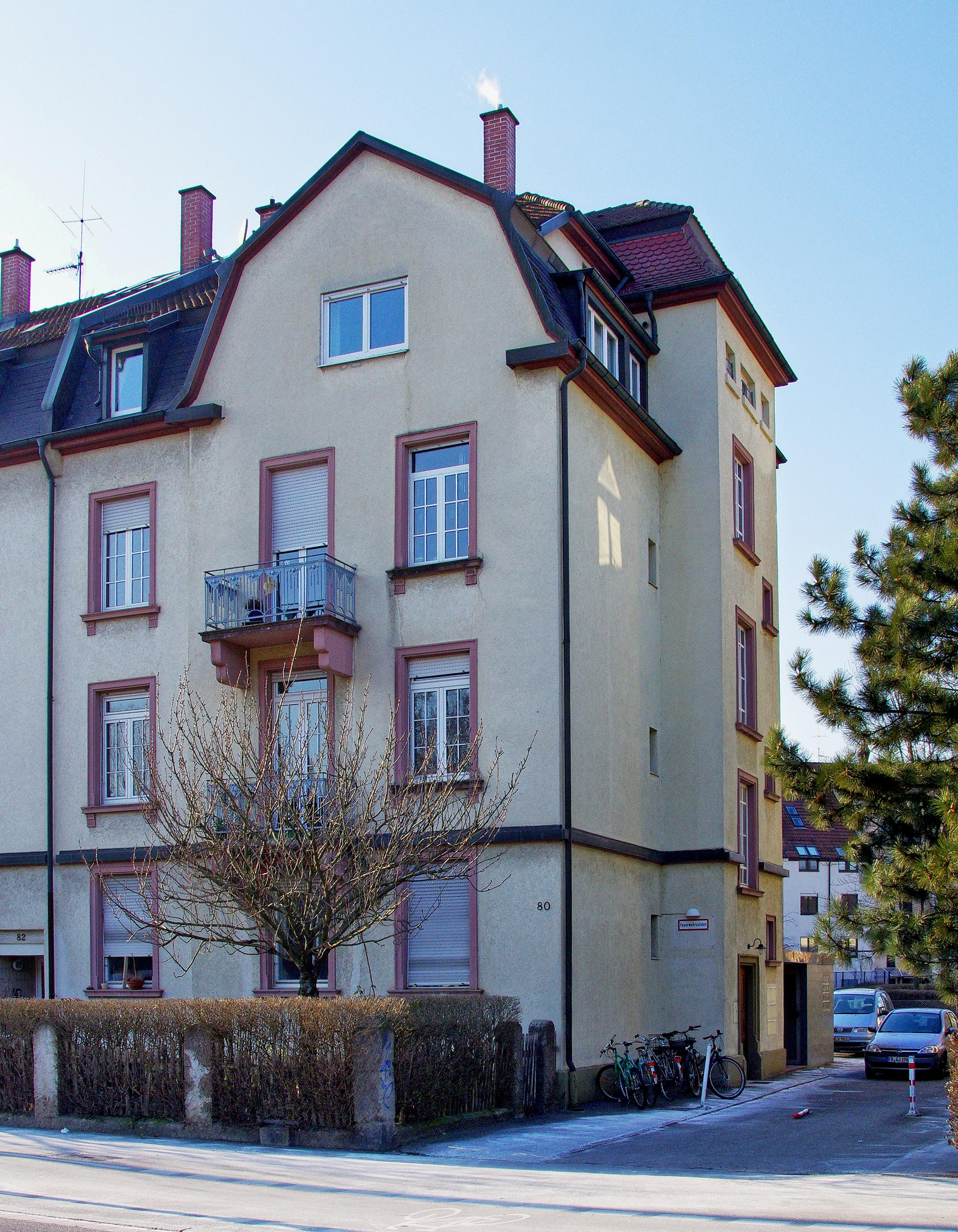 AV Merzhausia, Merzhauser Straße 80, 79100 Freiburg